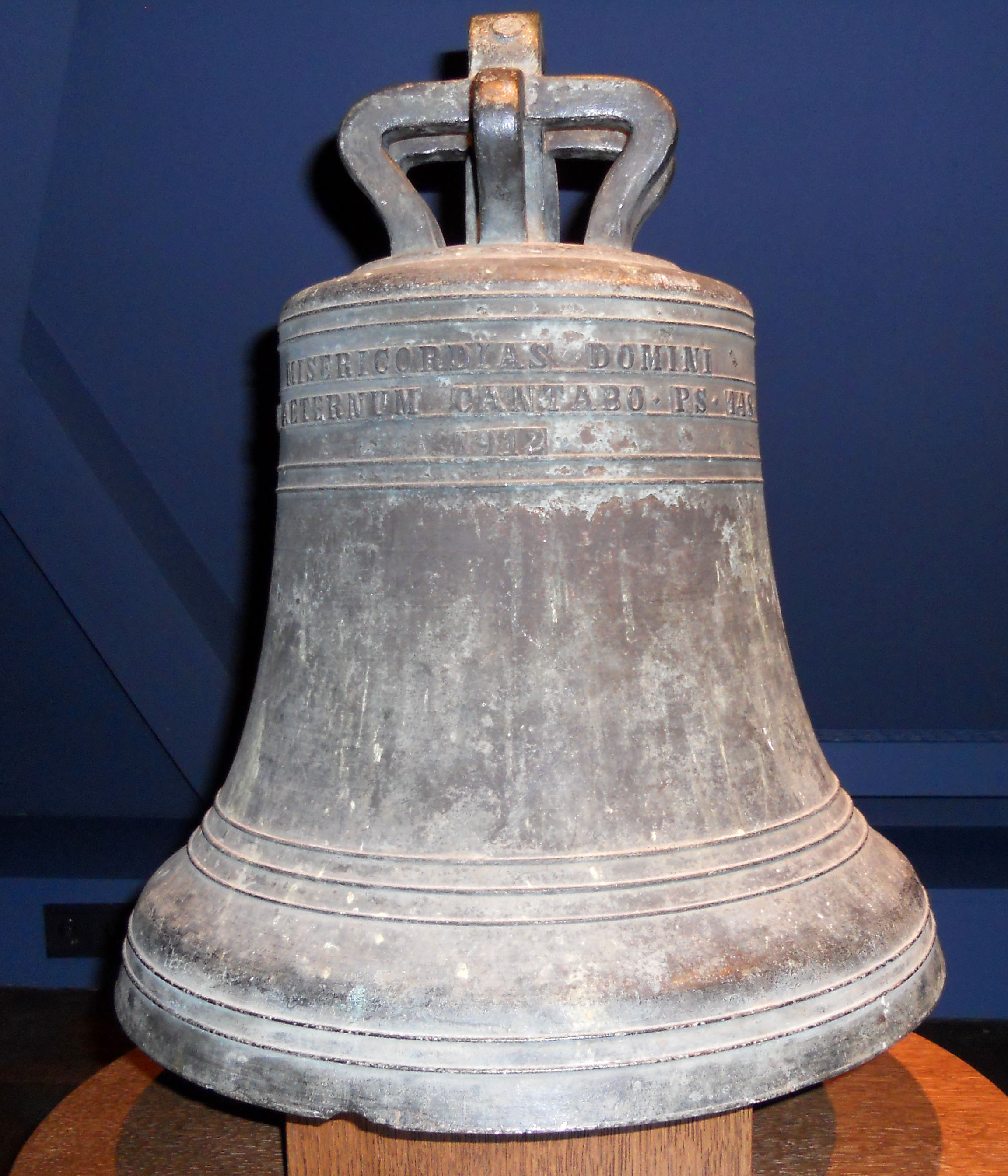 Glocke im Haus Hövener